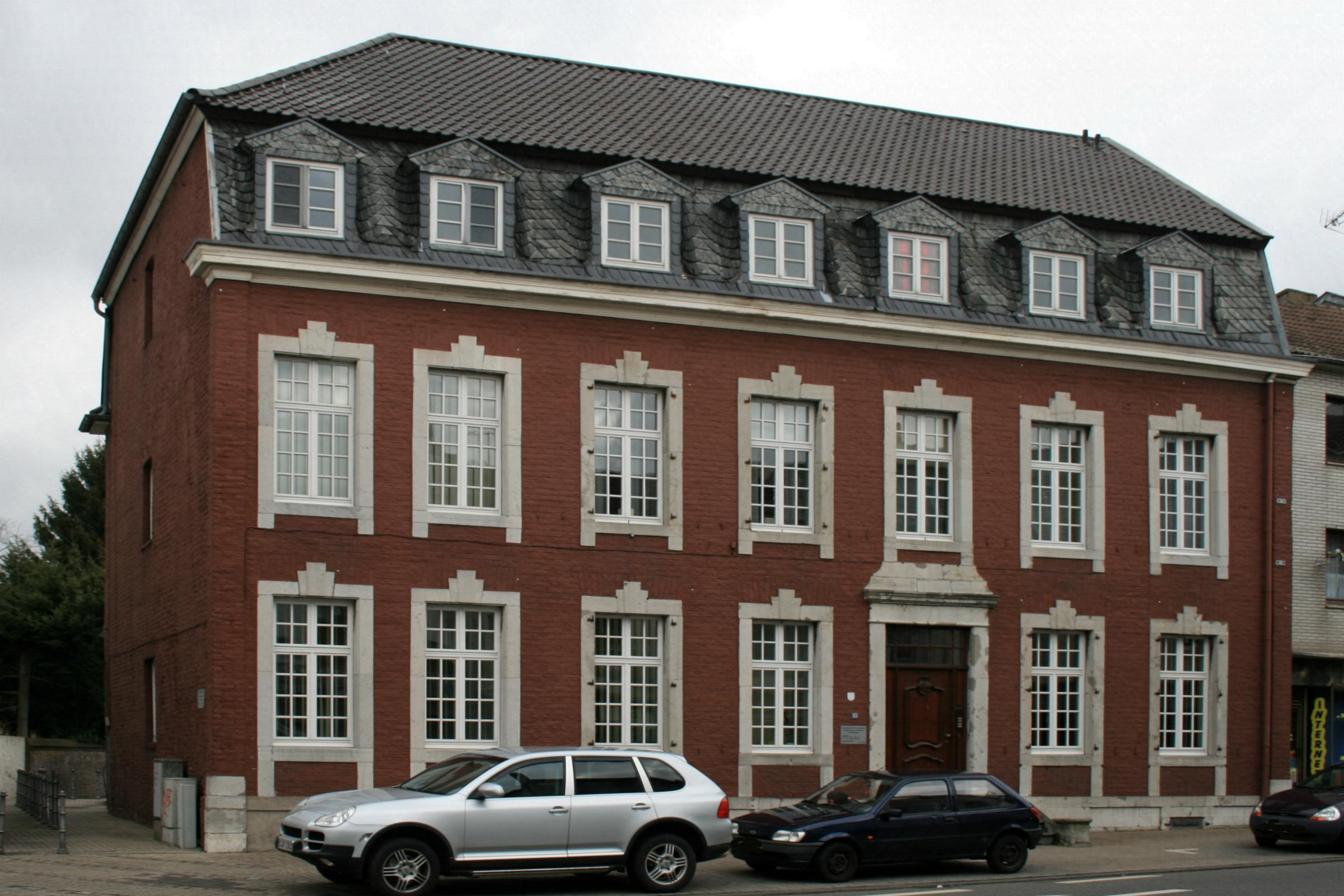 Evangelisches Gemeindehaus/Gemeindebüro, Konrad-Adenauer-Straße 83, Denkmal Nr. 29 in Geilenkirchen-Hünshoven